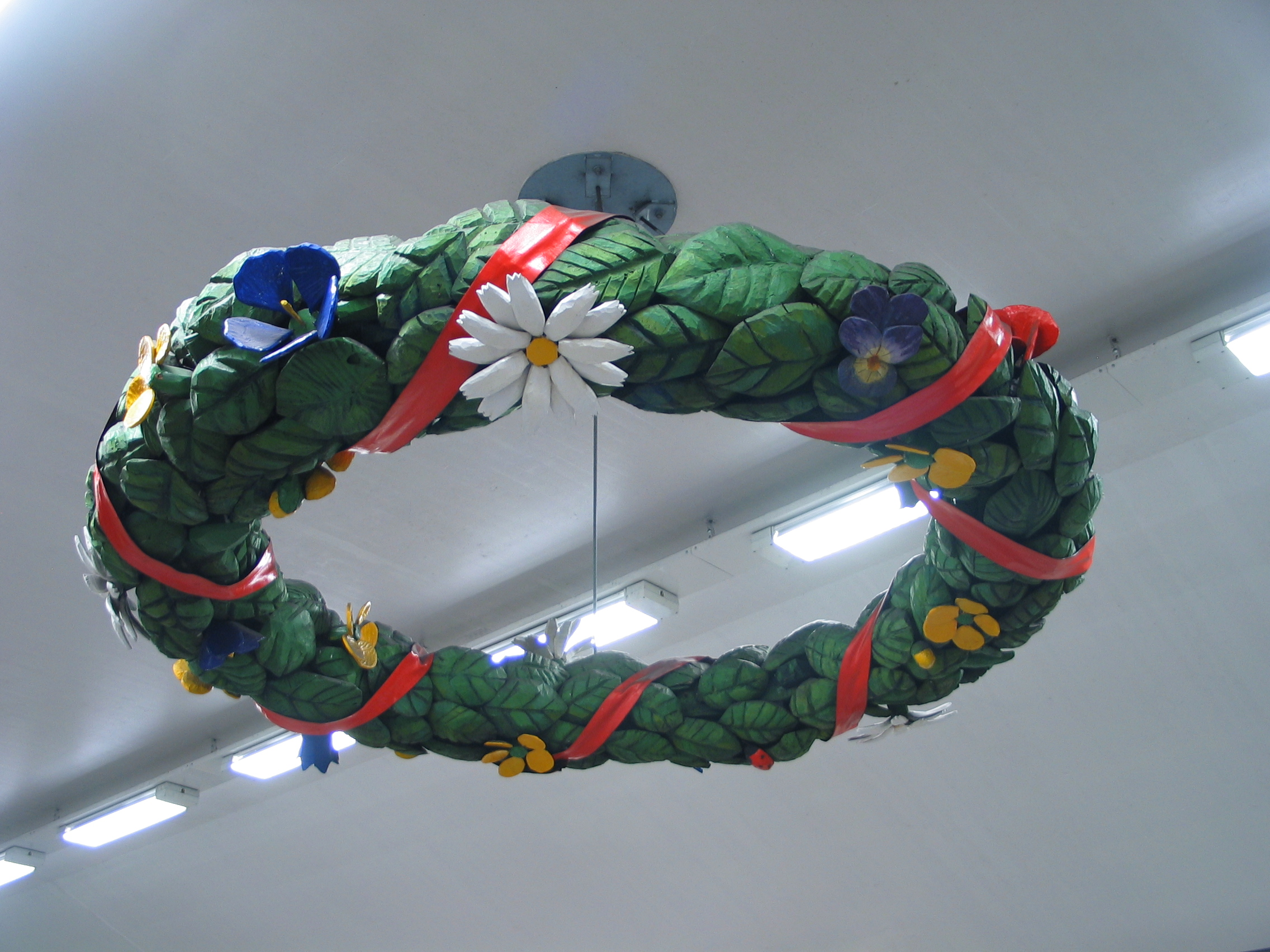 Midsommarkransen, a metro station in Stockholm, Sweden.